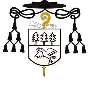 Wappen Silvanus Speth, 1611 - 1646, Abt von Münsterschwarzach (1641-1646)